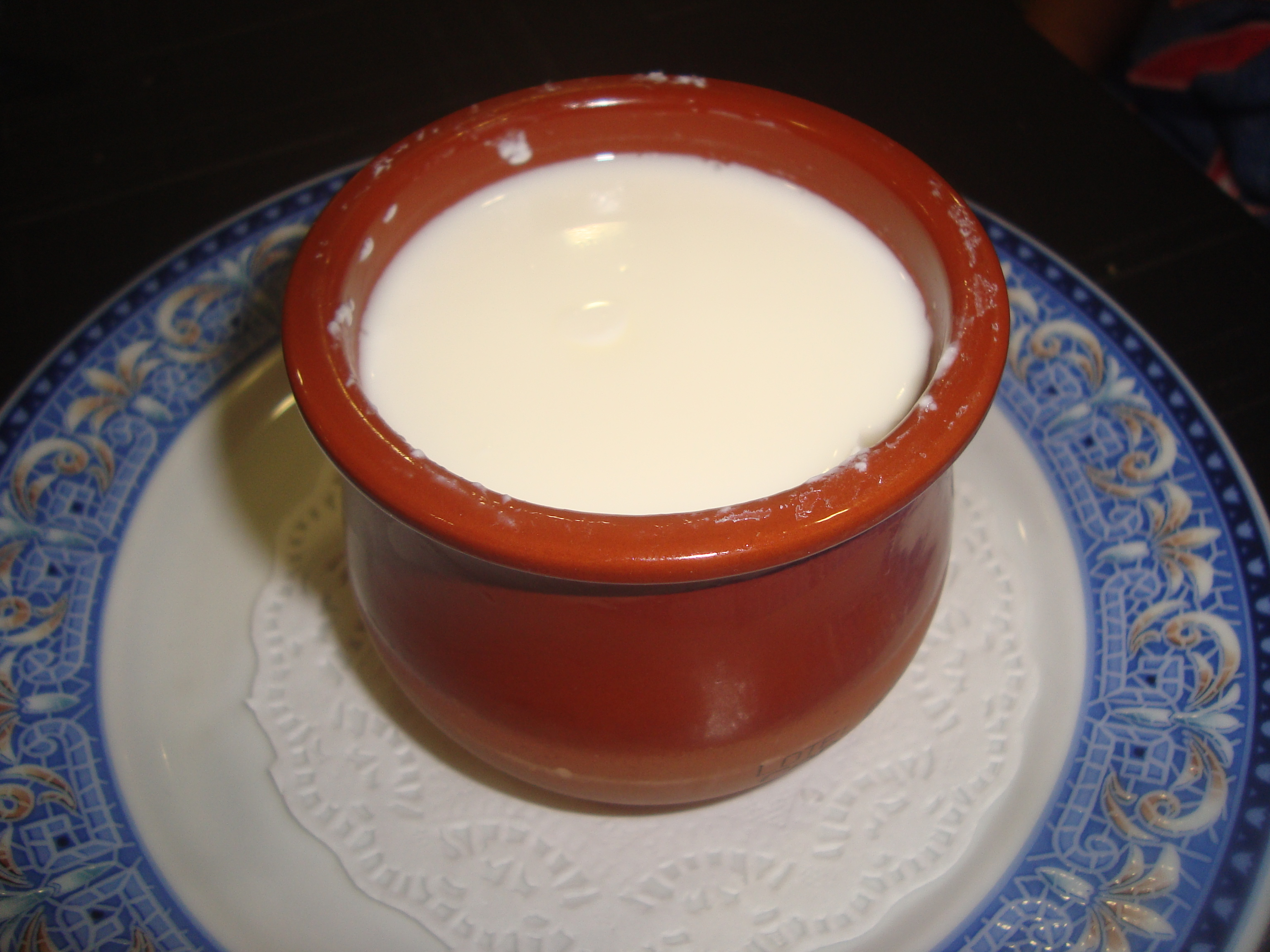 Cuajada natural de leche de oveja.